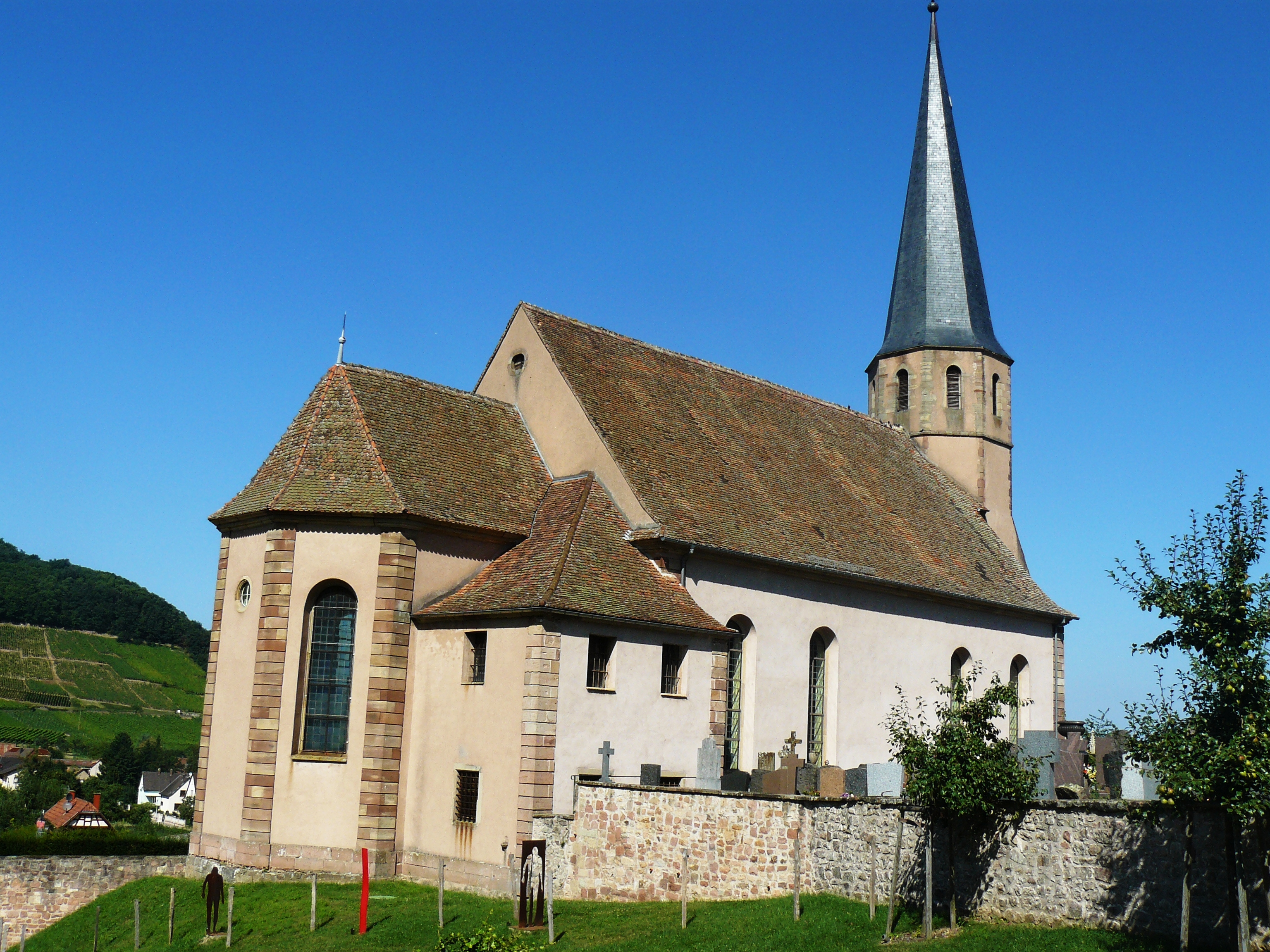 Chapelle Saint-André, ancienne église